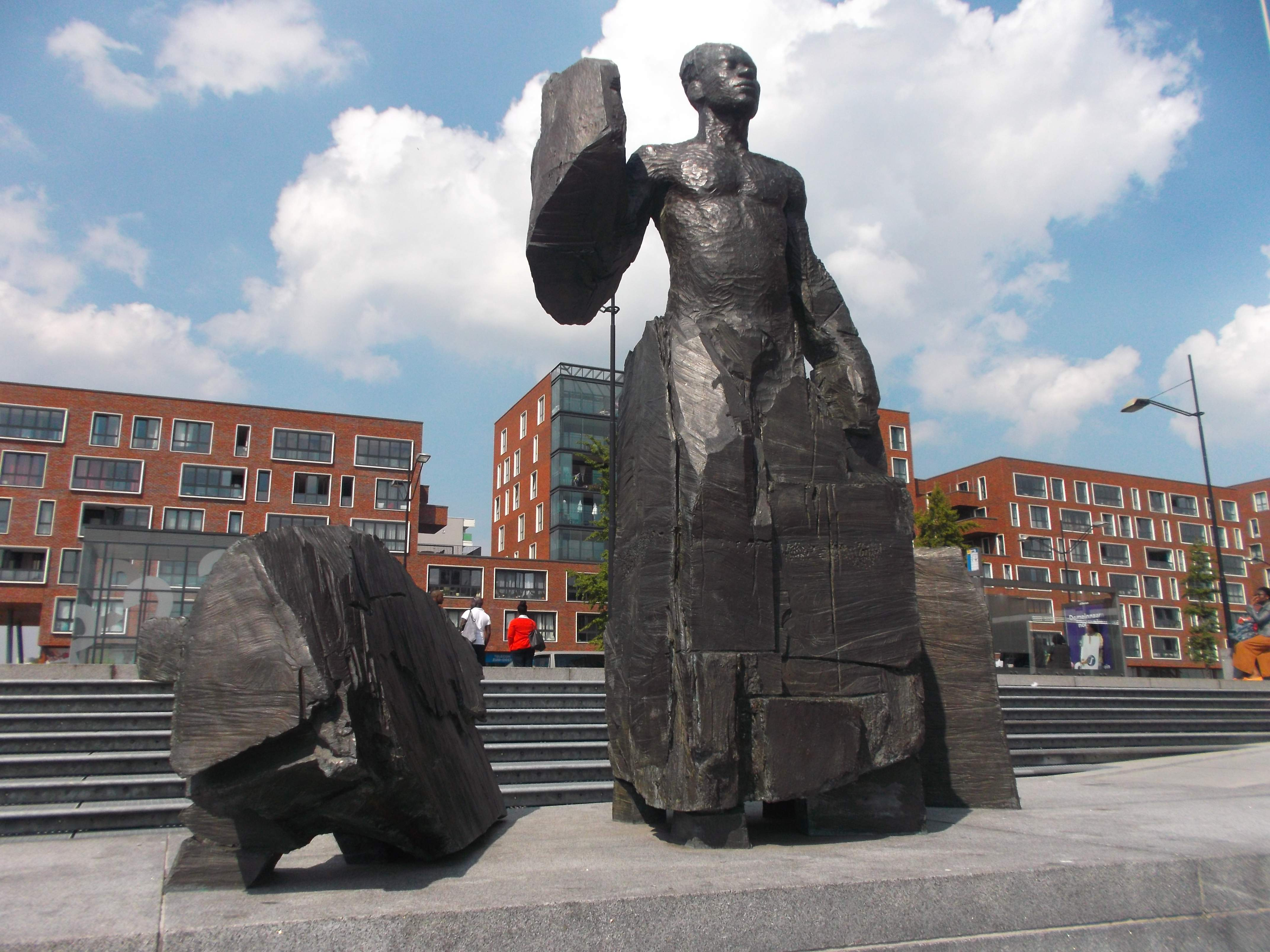 Beeld voor Antom de Kom, Amsterdam-Zuidoost, Anton de Komplein. 14 augustus 2017 - Beeld door Jikke van Loon, 2006.